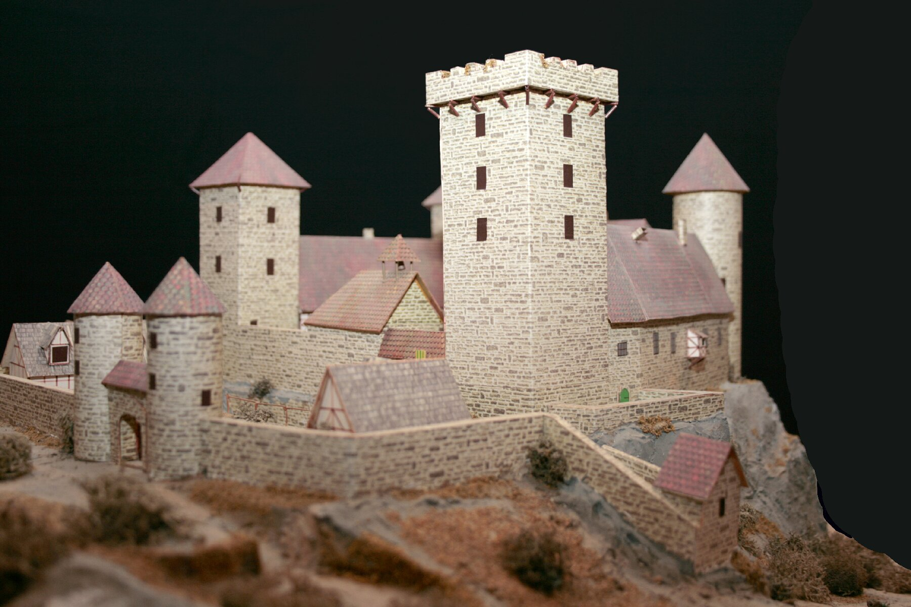 Modell der Peperburg, Museum der Stadt Lennestadt in Grevenbrück, erstellt von Josef Birkelbach nach einem Gemälde von Reinhold Bicher